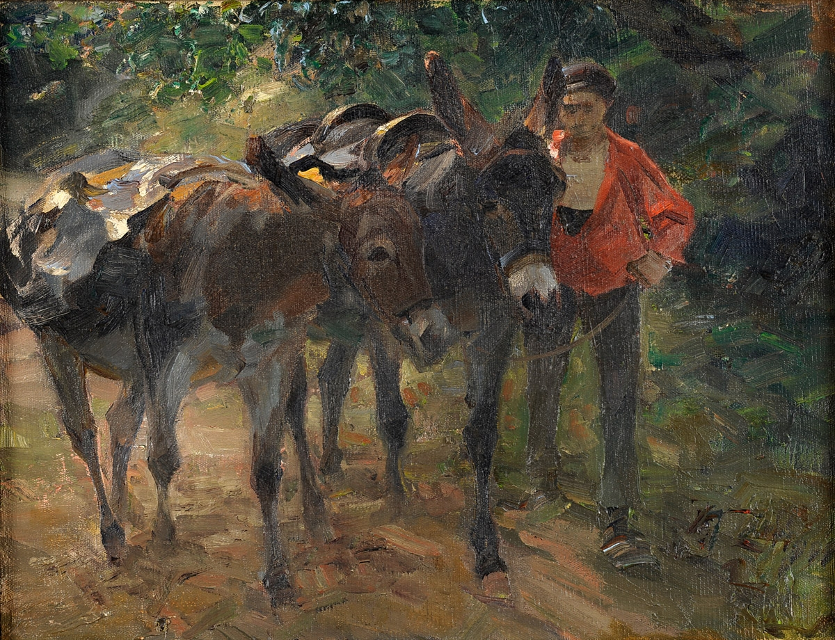 Auf dem Weg zum Wolkenhof. Öl auf Leinwand, 46.5 x 60 cm